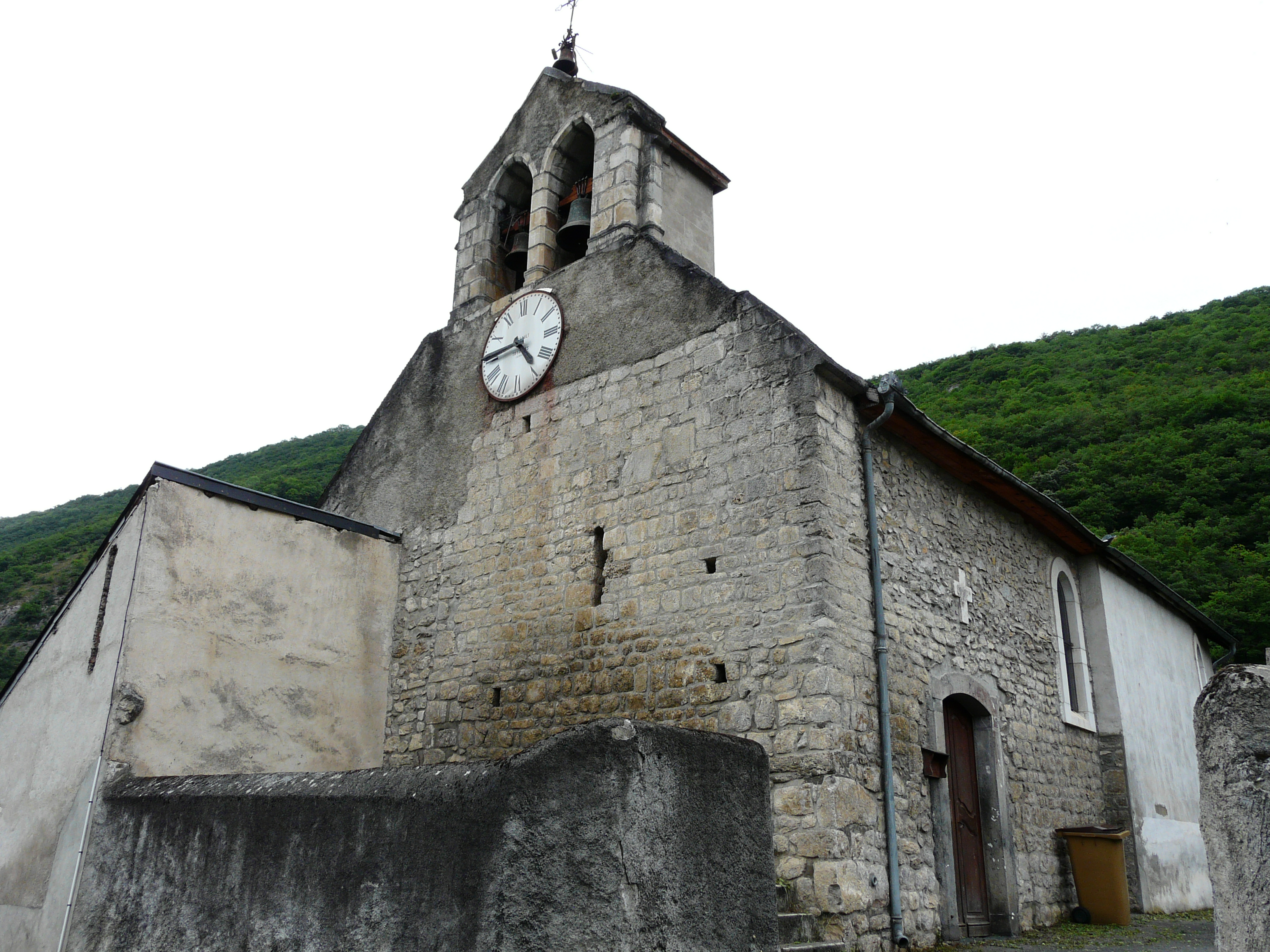 L'église Saint-Nazaire, Galié, Haute-Garonne, France.